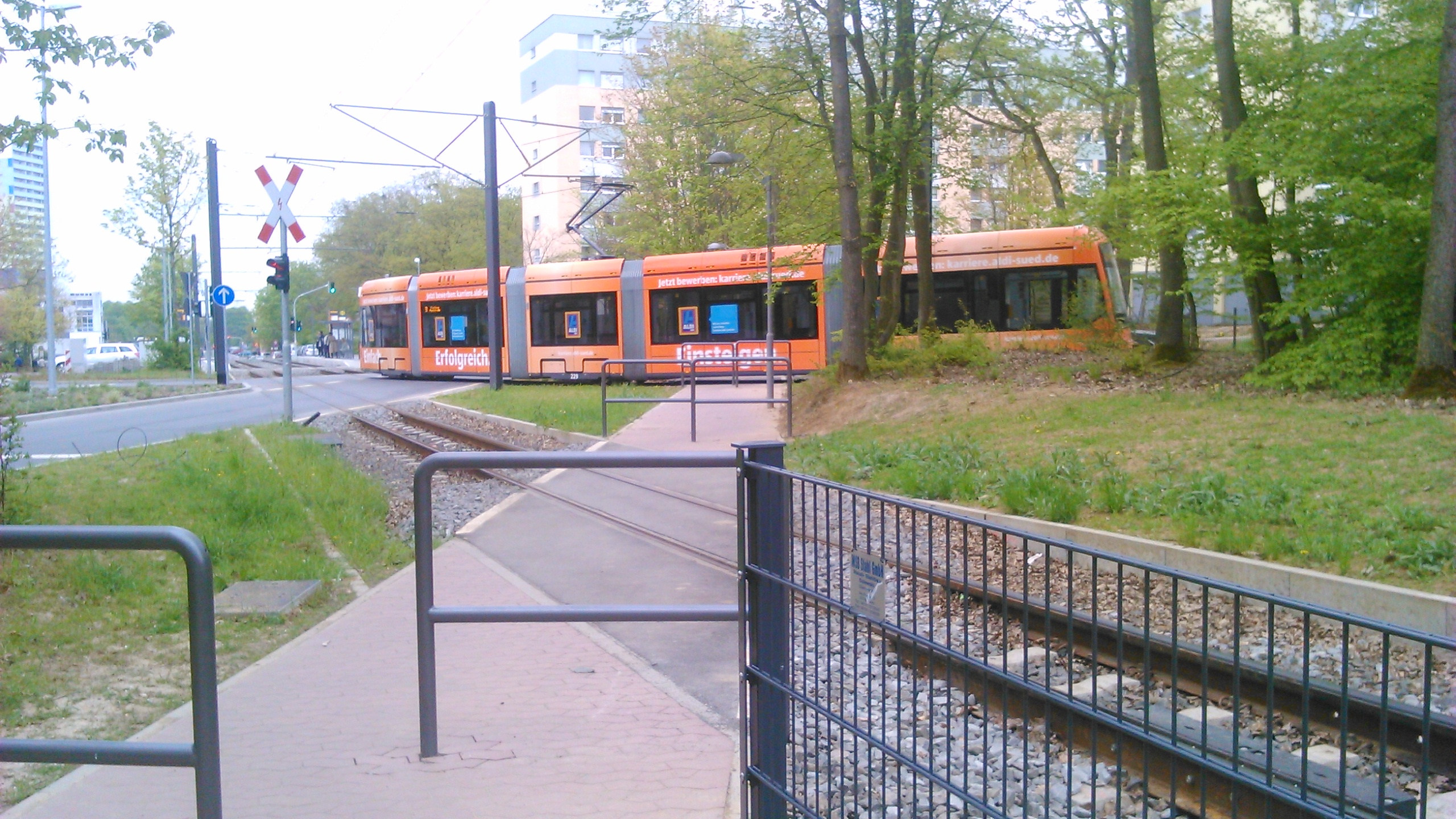 Eine Straßenbahn in Richtung Mainz-Finthen verlässt die Wendeschleife auf dem Lerchenberg.